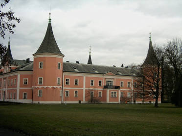 Zámeček v Sokolově